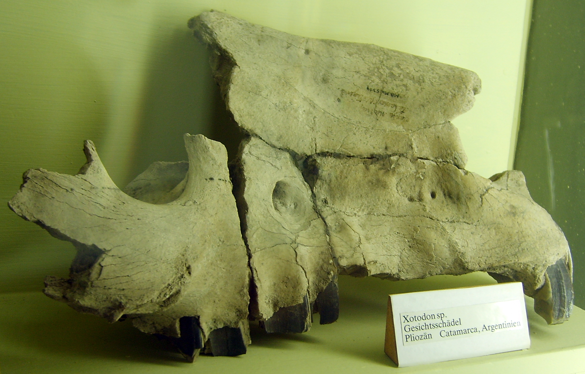 Xotodon sp. skull at the Museum für Naturkunde, Berlin.